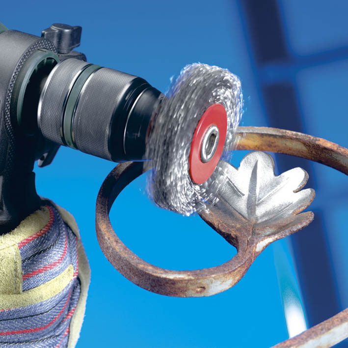 Entrosten mit einer Drahtbürste Hochgeladen und freigegeben unter der unten genannten Lizenz durch OSBORN International GmbH